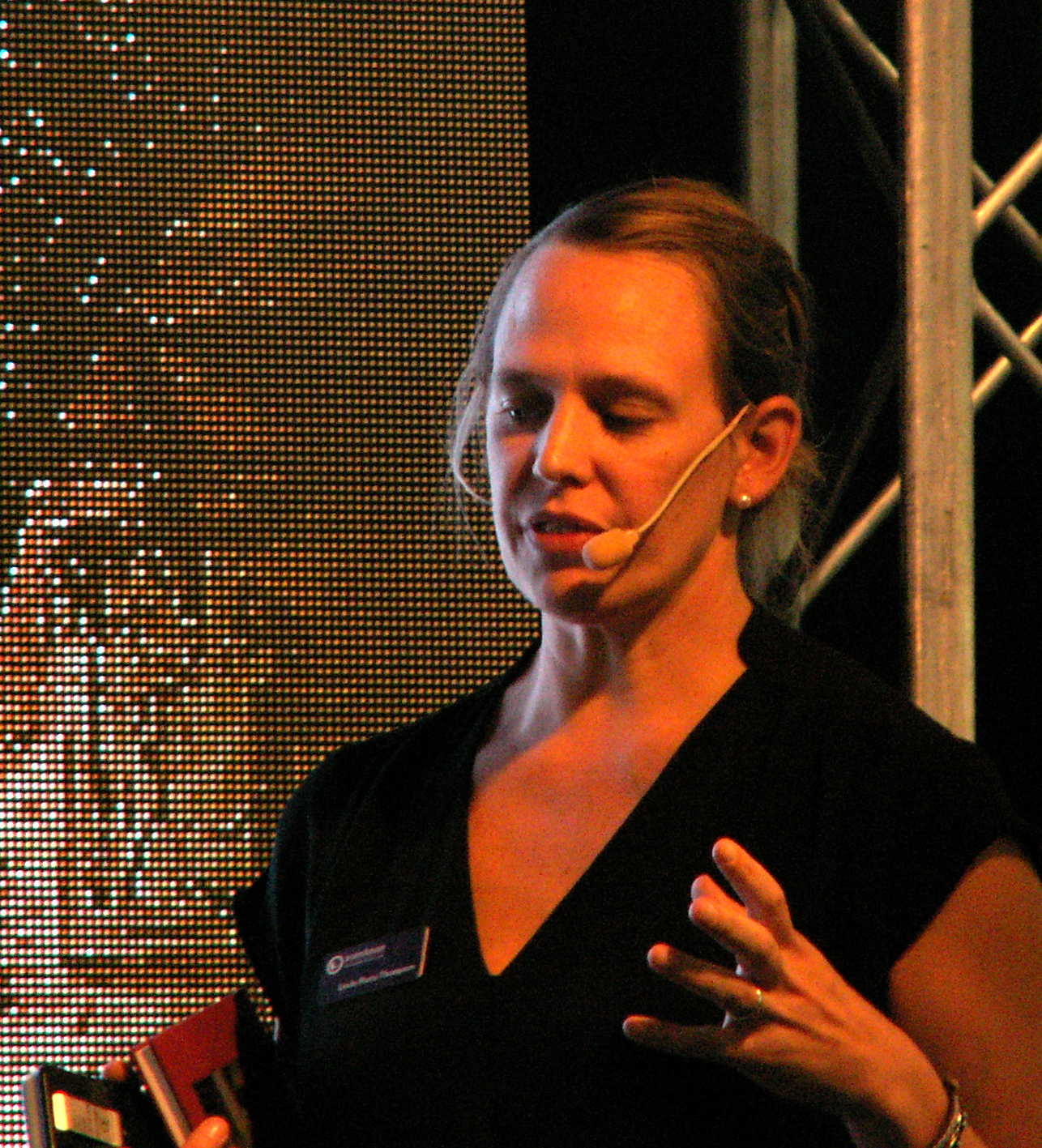 Linda Maria Thompson vid Bokmässan i Göteborg 2016.